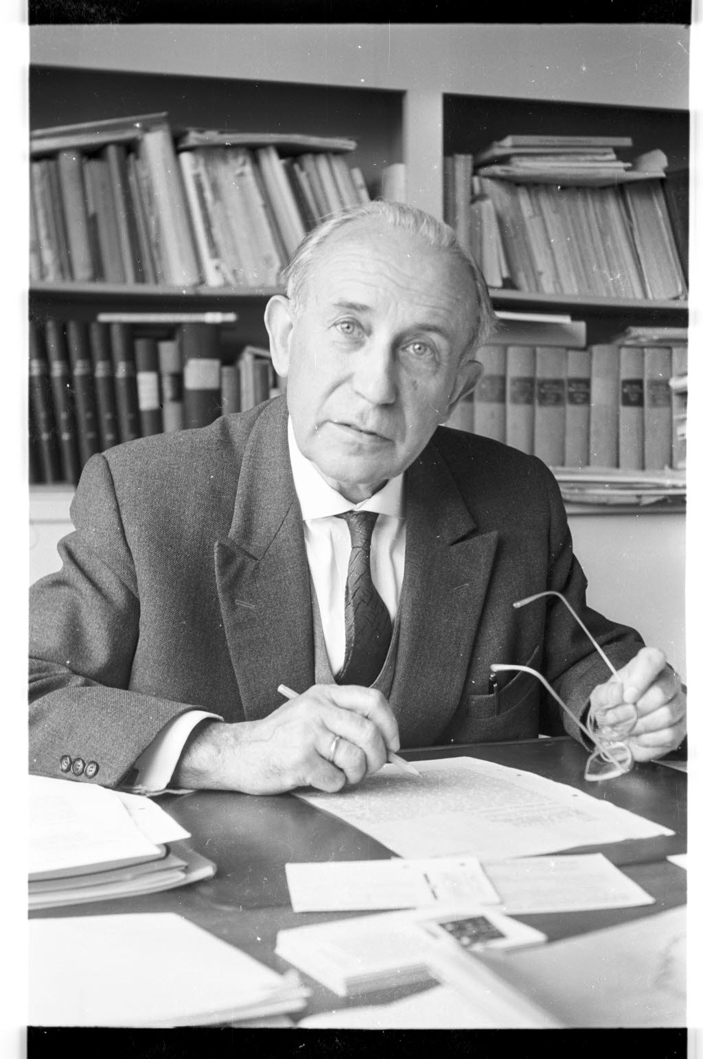 Direktor des Instituts für physiologische Chemie und Physikochemie an der Christian-Albrechts-Universität (CAU).